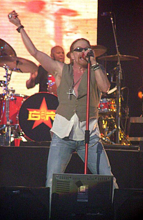 Axl Rose på Roskilde Festival 2006.